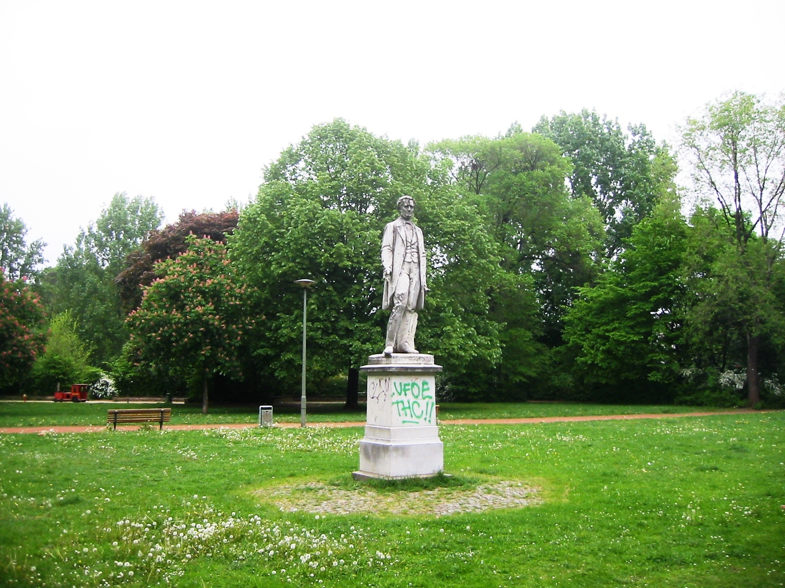 Denkmal von Franz Leo Benedikt Waldeck im Waldeckpark in Berlin-Kreuzberg